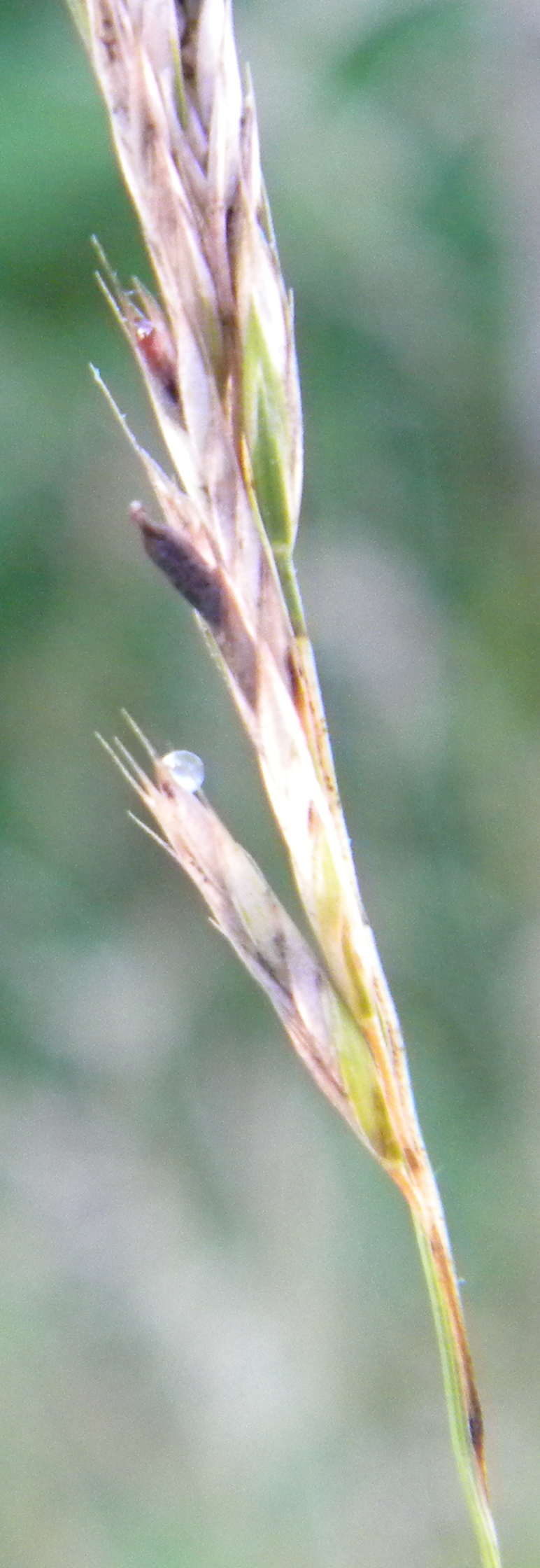 Miellat et ergot sur Festuca rubra